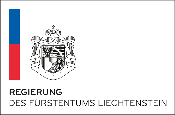 Logo Regierung Fürstentum Liechtenstein